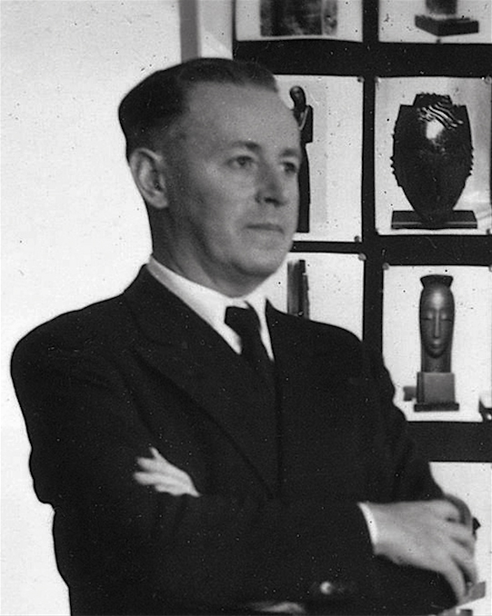 Gustave Miklos devant les photos de ses œuvres, 1937, photo de famille